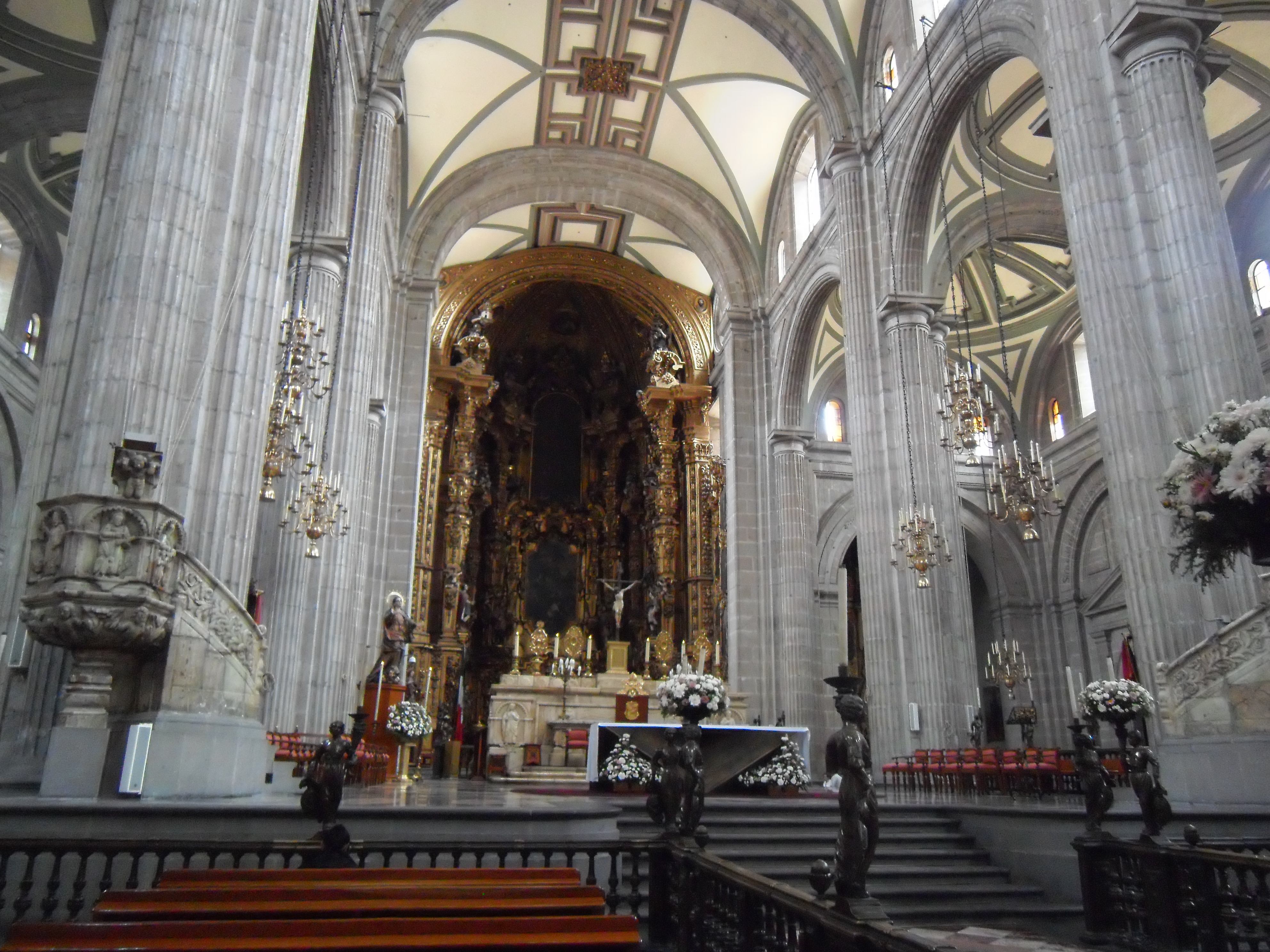 Interior de la Catedral Metropolitana